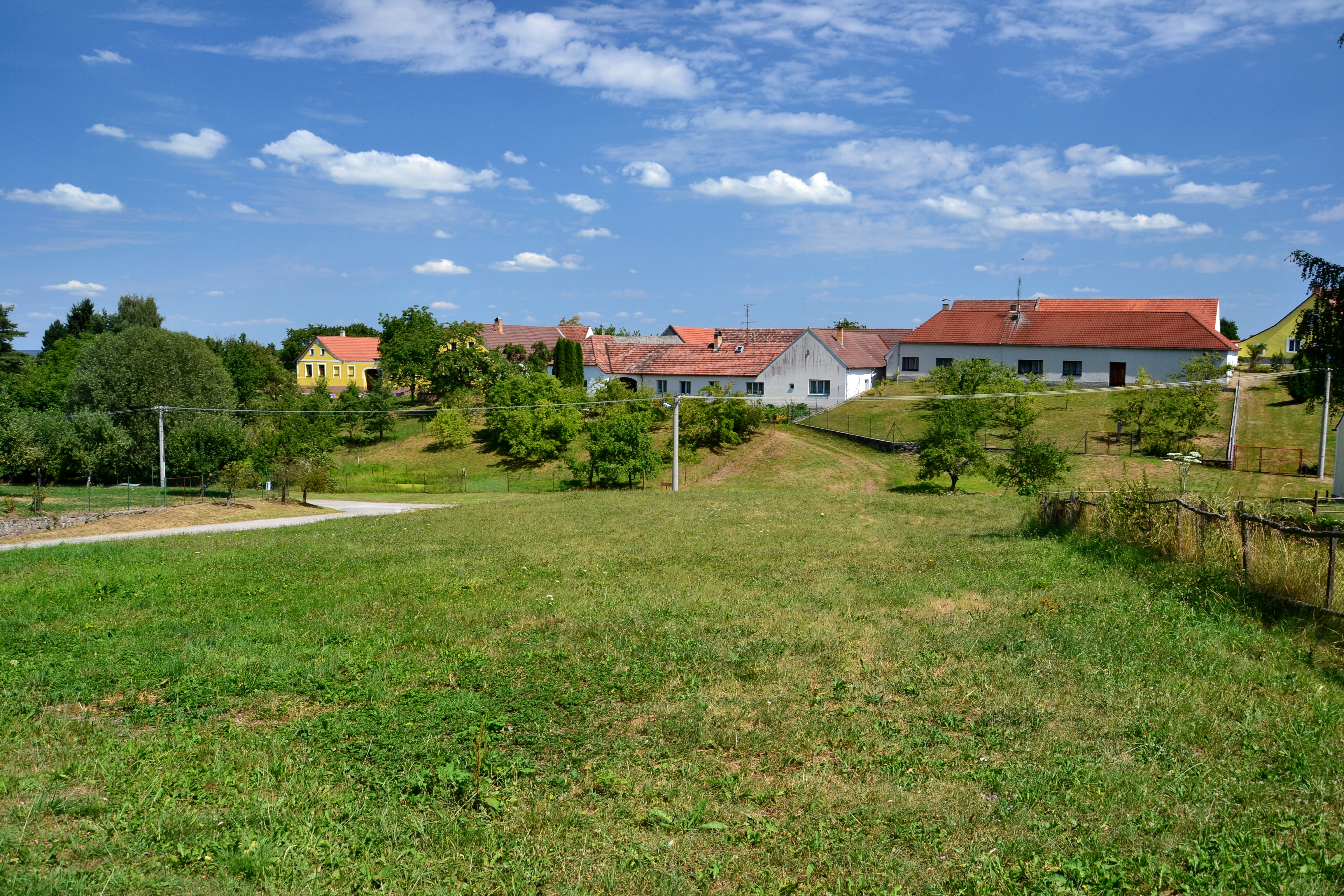 Statky na východním okraji vesnice